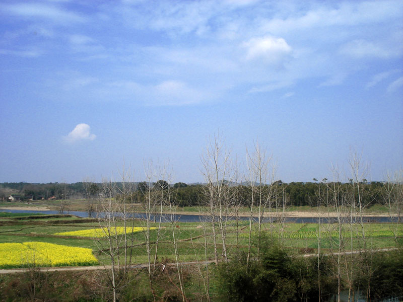 2007渣塘烂坝组